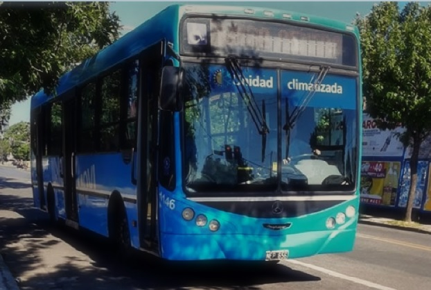 Mercedes-Benz OH 1618 L-Sb de la empresa estatal Movi, operadora de la línea Ronda del Centro